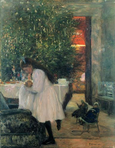 Unter dem Weihnachtsbaum (Berliner Weihnachtszimmer), Öl auf Lwd.; 75 x 60,5; Collection: Stiftung Stadtmuseum Berlin